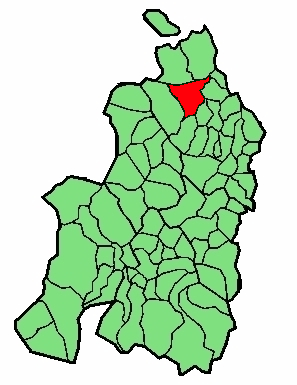 aipaturiko udalerriaren kokapena Nafarroa Beherean